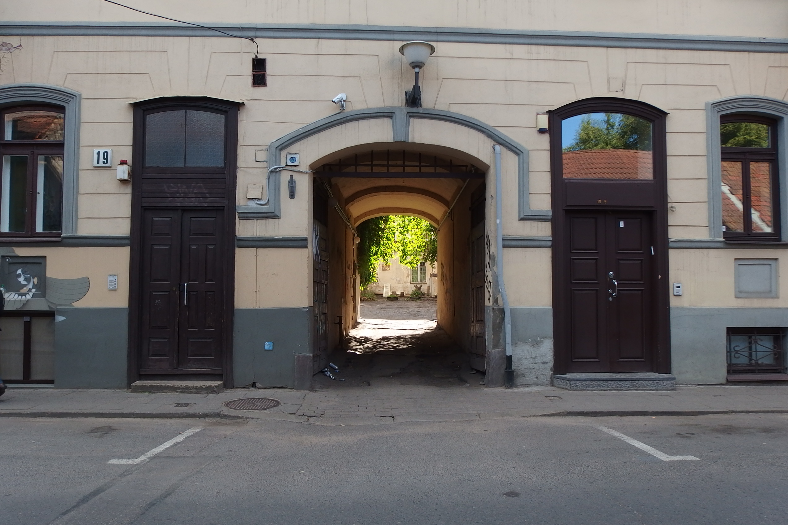 ulica Totorių w Wilnie